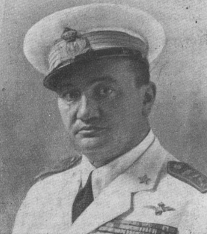 Roberto Lordi (Napoli, 11 aprile 1894 – Roma, 24 marzo 1944) generale di brigata aerea italiano, martire delle Fosse Ardeatine e Medaglia d'oro al valor militare alla memoria.